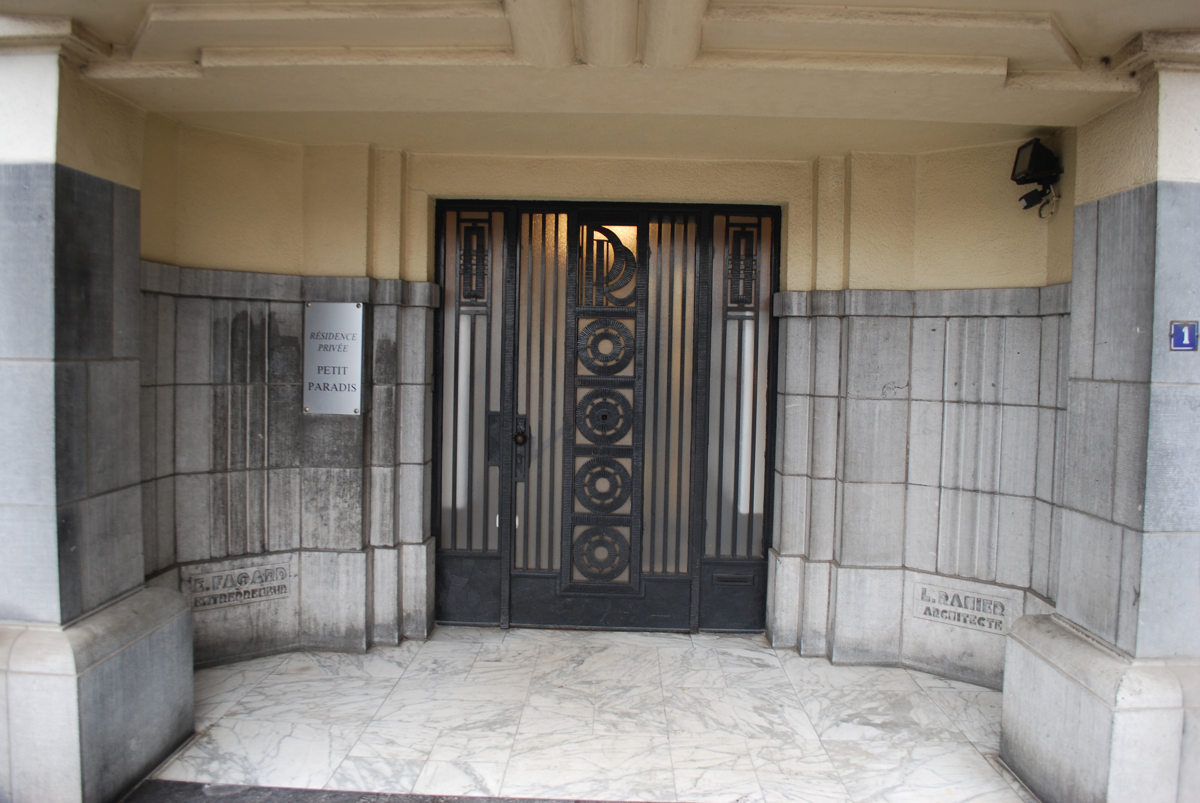 Vue de la rue de Fragnée à Liège.